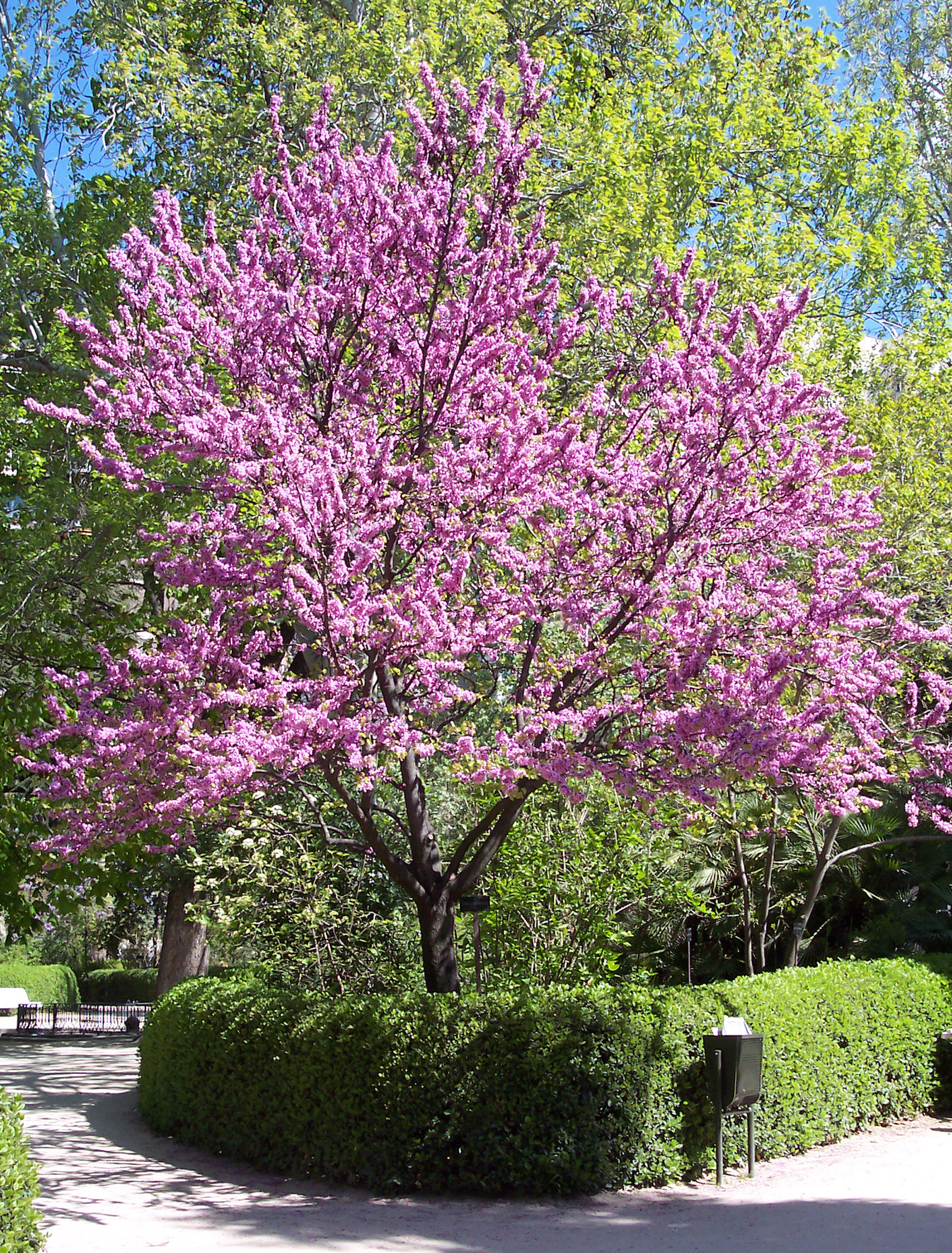 Cercis chinensis. Real Jardín Botánico, Madrid.